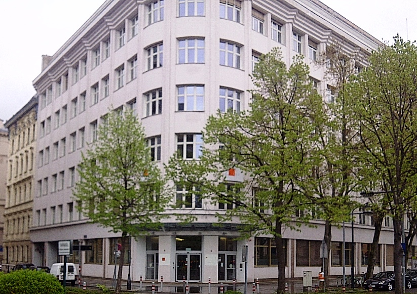 FMA am Otto Wagner Platz in 1090 Wien